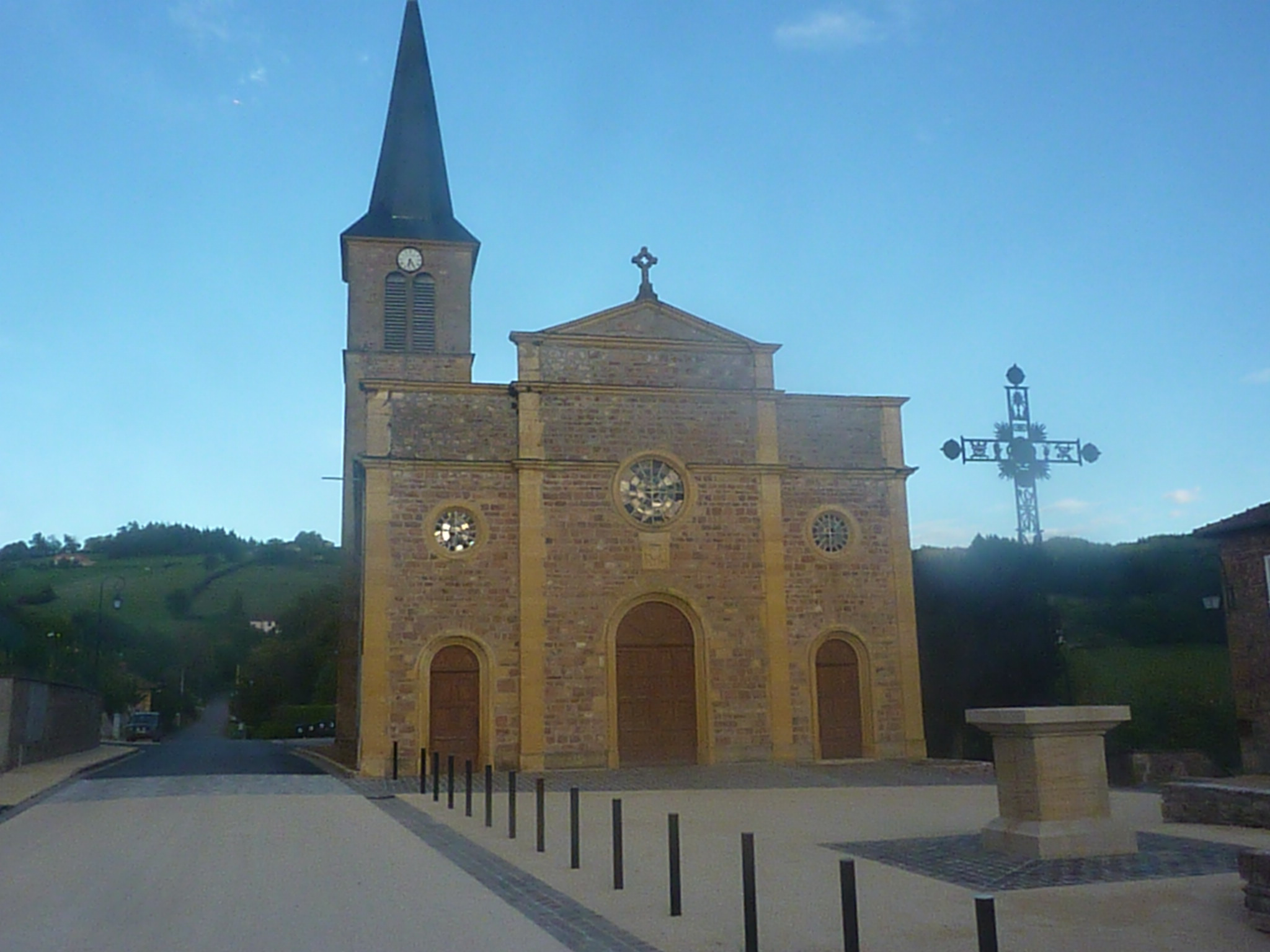 Place de l'église d'Arcinges